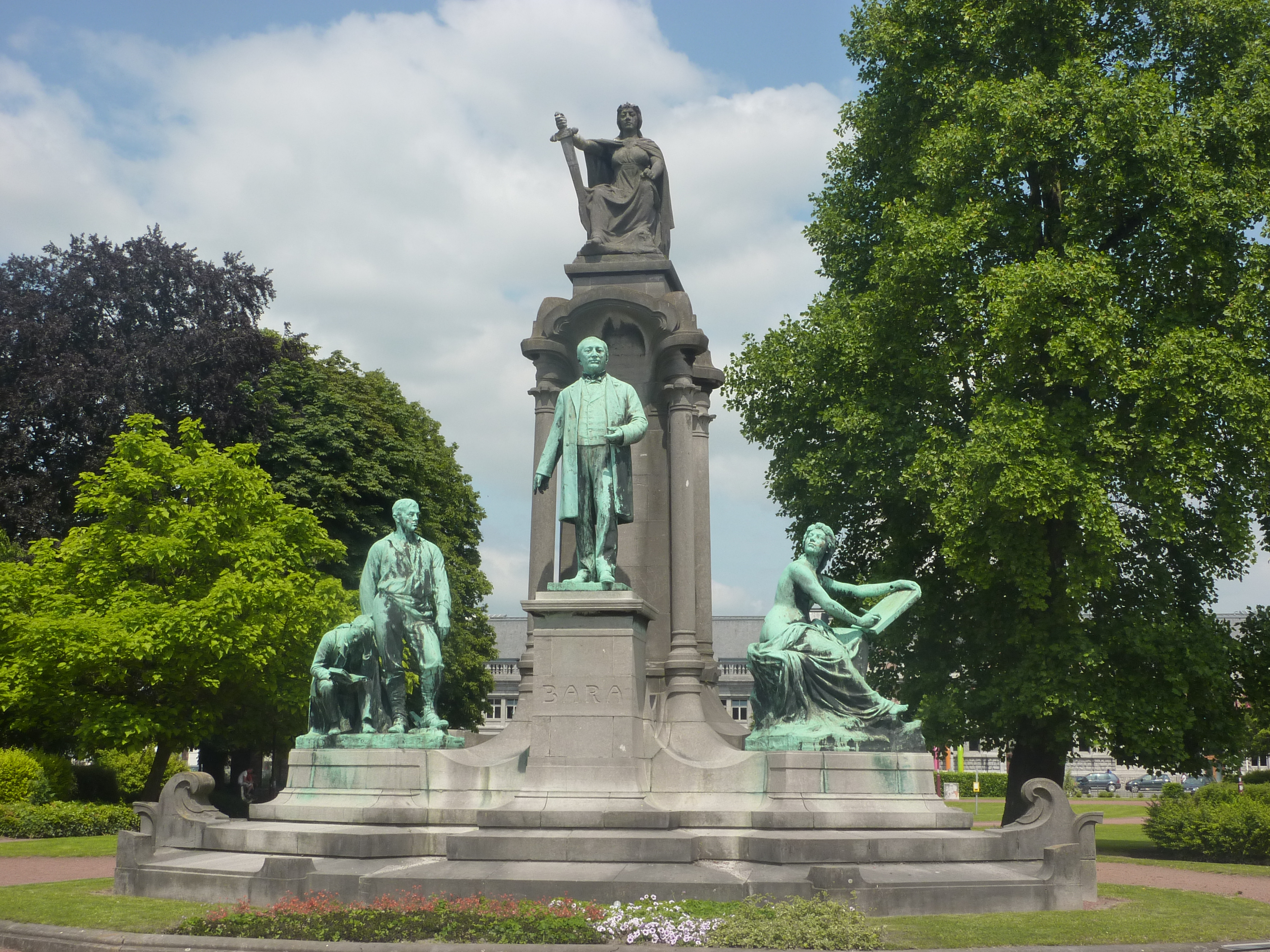 Tournai, Place Crombez